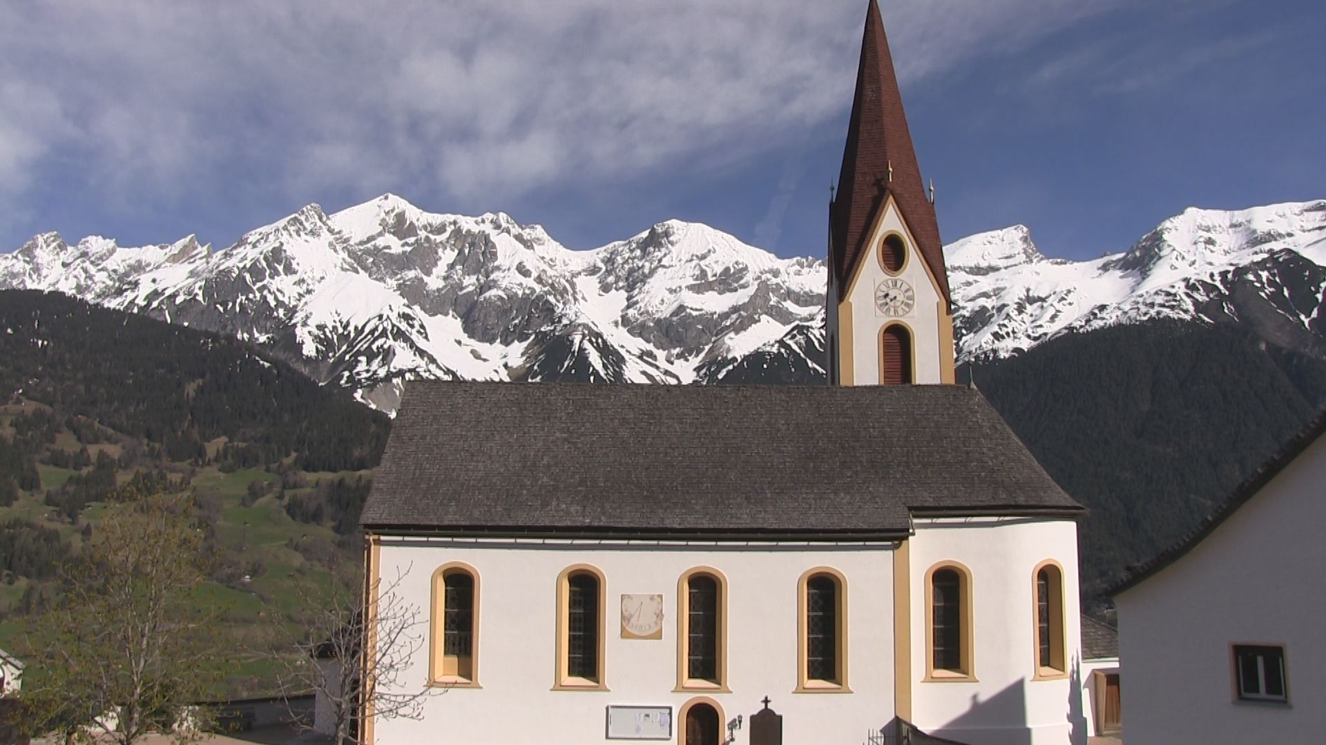 Kath. Pfarrkirche hl. Magnus